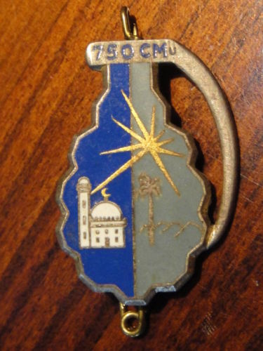 Insigne de la 750e Cie Munitions stationnée en Algérie.